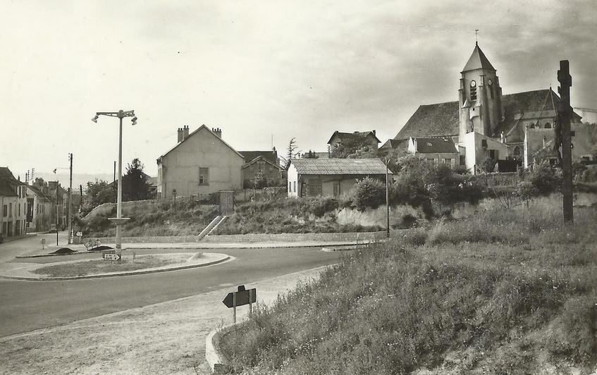 Chelles.Eglise